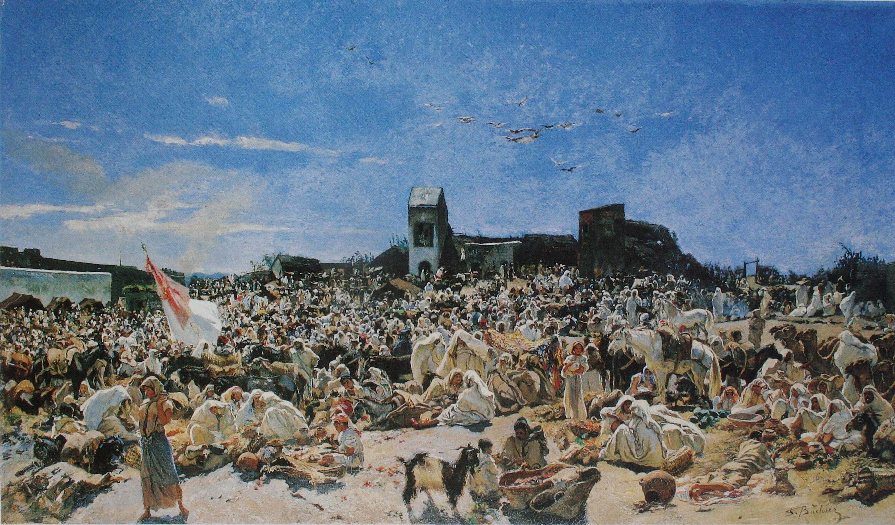 Markt von Tanger, Gemälde von Frank Buchser, 1880, 64.5 x 112 cm, Kunstmuseum Solothurn, Depositum der Gottfried Keller-Stiftung